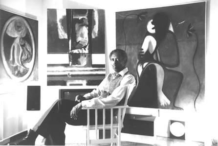 Eugene J. Martin self-portrait, 1990